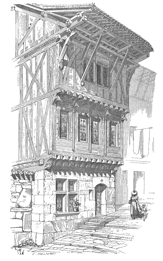 ... Dans la petite ville d'Annonay, il existe, ou il existait encore il y a quelques années (car ces vieilles habitations disparaissent comme les feuilles en automne), un petit nombre de maisons des XIVe et XVe siècles presque entièrement construites en bois, dont la construction méritait d'être étudiée, et qui avaient échappé aux incendies du XVIe siècle. Nous donnons (22) l'une d'elles, que nous classons parmi les maisons du XIVe siècle. Sur un rez-de-chaussée élevé en gros blocs de pierre est posée une épaisse en rayure en sapin, dont le troisième rang forme plancher et déborde sur la face de manière à porter, en encorbellement, le pan de bois du premier, composé sur la face antérieure de trois sablières superposées, jointives, sur lesquelles s'assemblent les montants. Deux poteaux corniers retiennent les extrémités des trois sablières. Latéralement, des pans de bois ordinaires, hourdés en moellon et mortier, forment murs mitoyens. Sur ce premier pan de bois, un second plancher en bascule reçoit un second étage également en pans de bois, surmonté d'un comble très-saillant sur la rue, dont notre figure explique suffisamment la combinaison ...